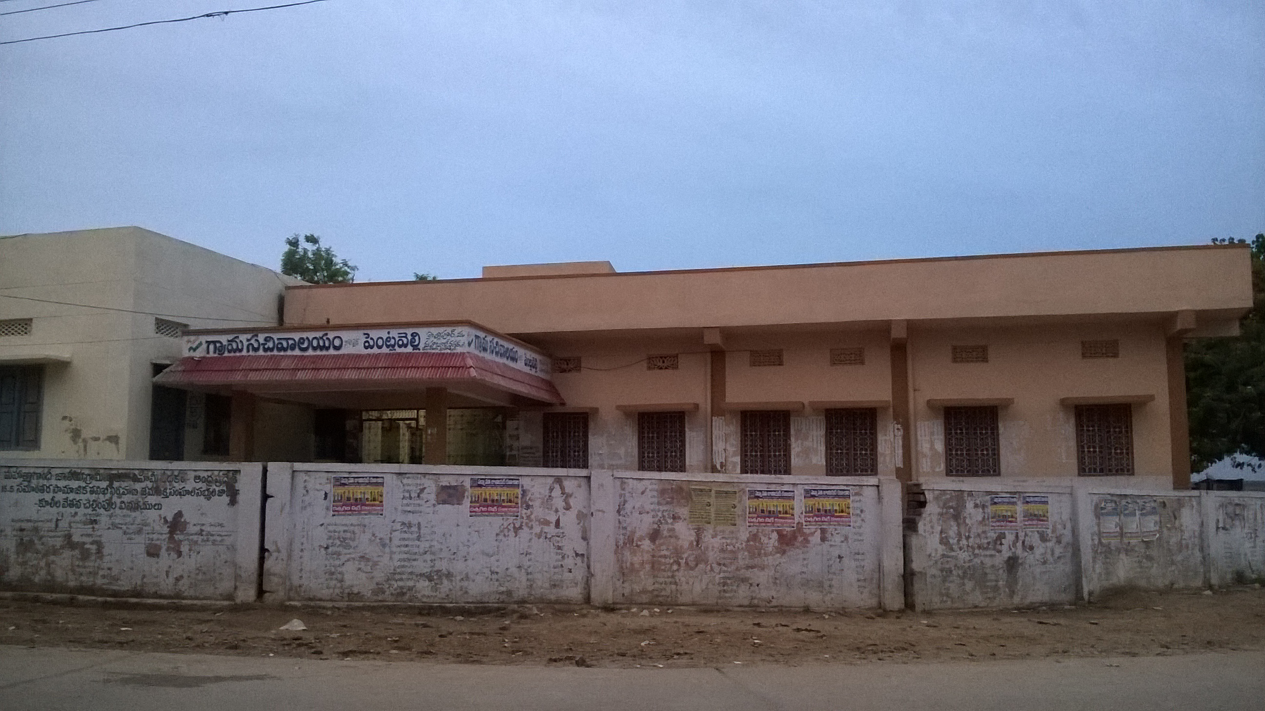 గ్రామ సచివాలయం, పెంట్లవెల్లి